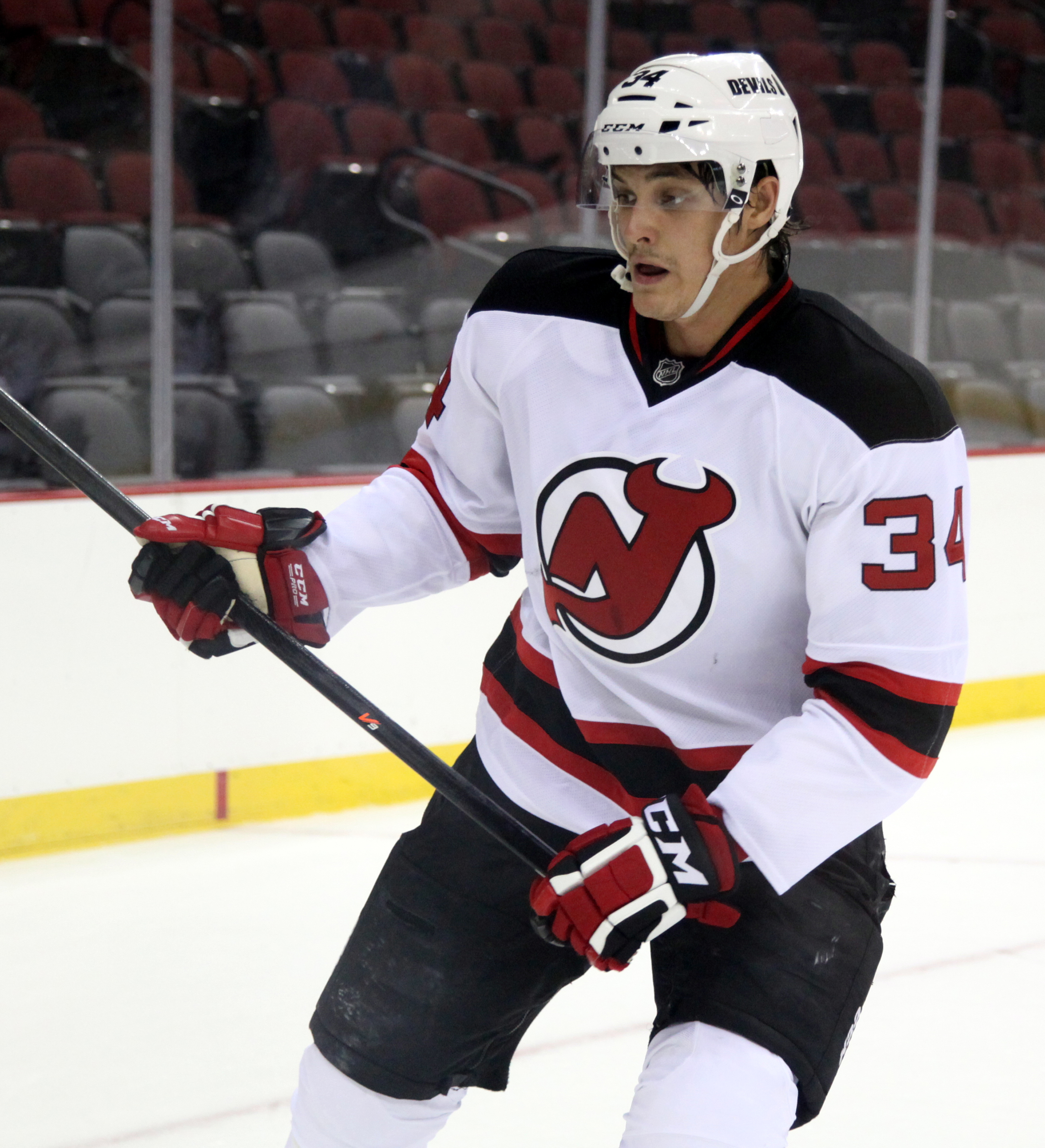 Hrabarenka in September 2015.